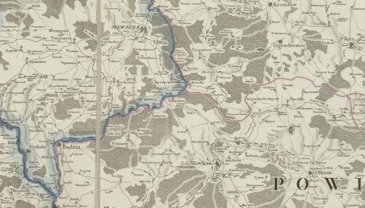 Fragment mapy Karola de Perthéesa :Mappa szczegulna Woiewodztwa Krakowskiego i Xięstwa Siewierskiego, 1787.